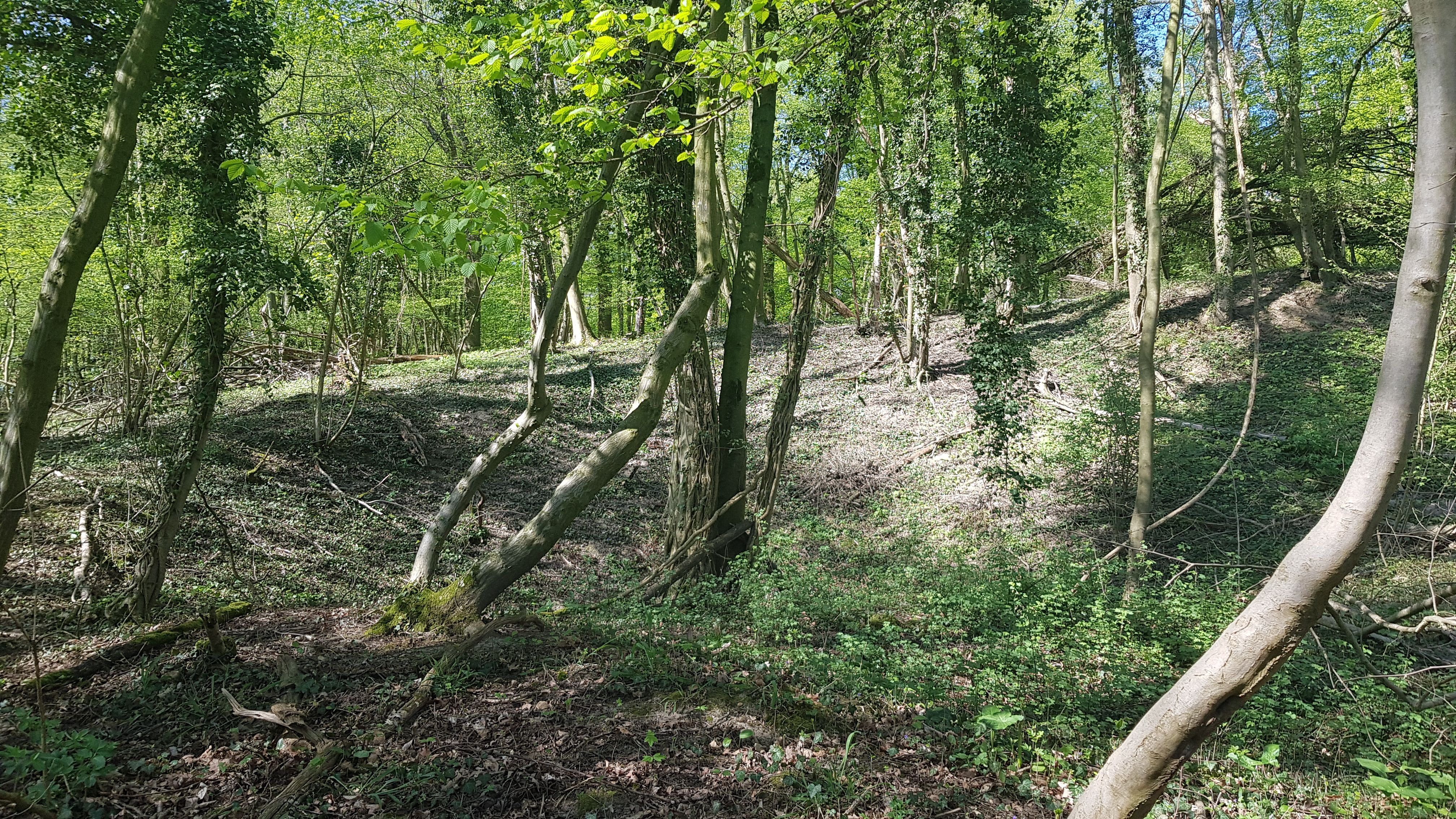 Groeve Gerendal, Oud-Valkenburg, Nederland